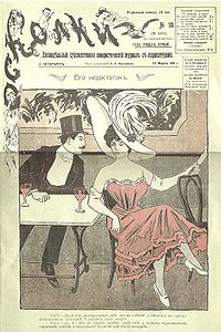 Copertina della rivista «Schegge» (Осколки) del 12 marzo 1911, San Pietroburgo